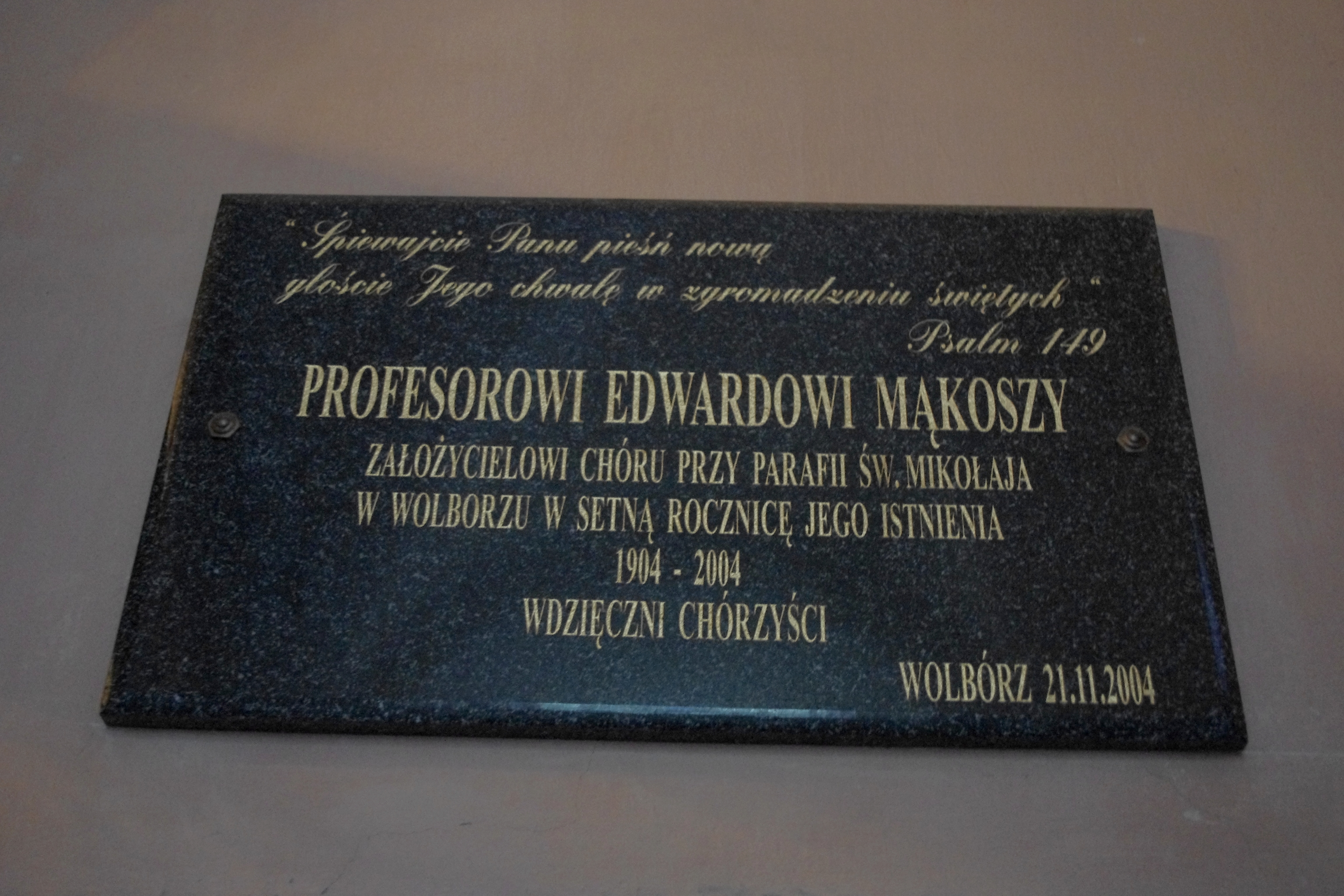 Tablica upamiętniająca Edwarda Mąkosze (1886-1974) – kompozytora, pedagoga, dyrygenta, organistę, etnomuzykologa, twórcę chóru mieszanego i orkiestry dętej w Wolborzu, w kolegiacie św. Mikołaja w Wolborzu